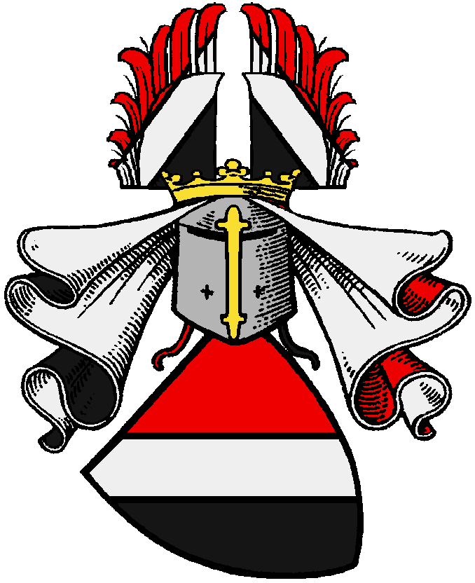 Stammwappen der Starschedel, altes meißnisches Adelsgeschlecht aus dem Ort Starsiedel bei der Stadt Lützen im Süden des heutigen Bundeslands Sachsen-Anhalt: Rot und Schwarz durch einen silbernen Schrägbalken (eigentlich Schrägrechtsbalken, abweichend ein Schräglinksbalken) geteilt, auf dem (gekrönten) Helm mit je nach Quelle rot-silbernen, schwarz-silbernen, rechts schwarz-silbernen und links rot-silbernen oder gemischt rot-silbern-schwarzen Decken ein Flug, beiderseits von Rot und Schwarz durch einen silbernen Schrägbalken geteilt, eigentlich rechts schräglinks und links schrägrechts.